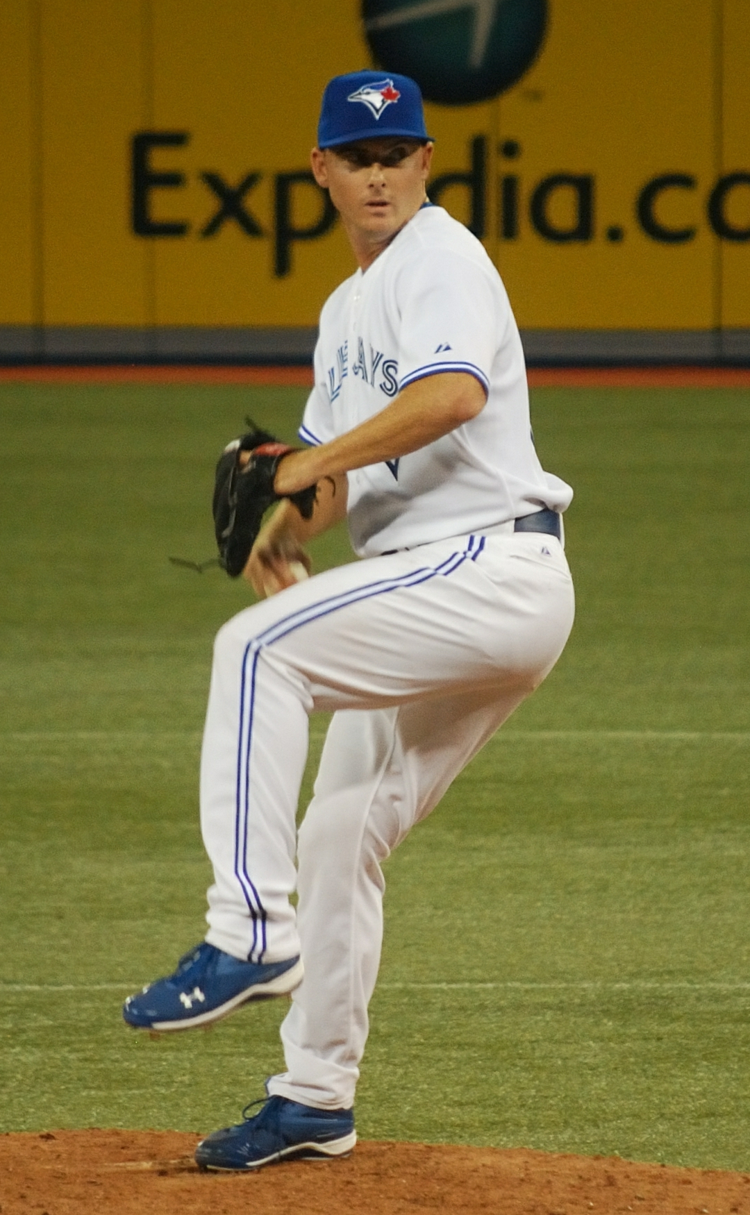 Sam Dyson